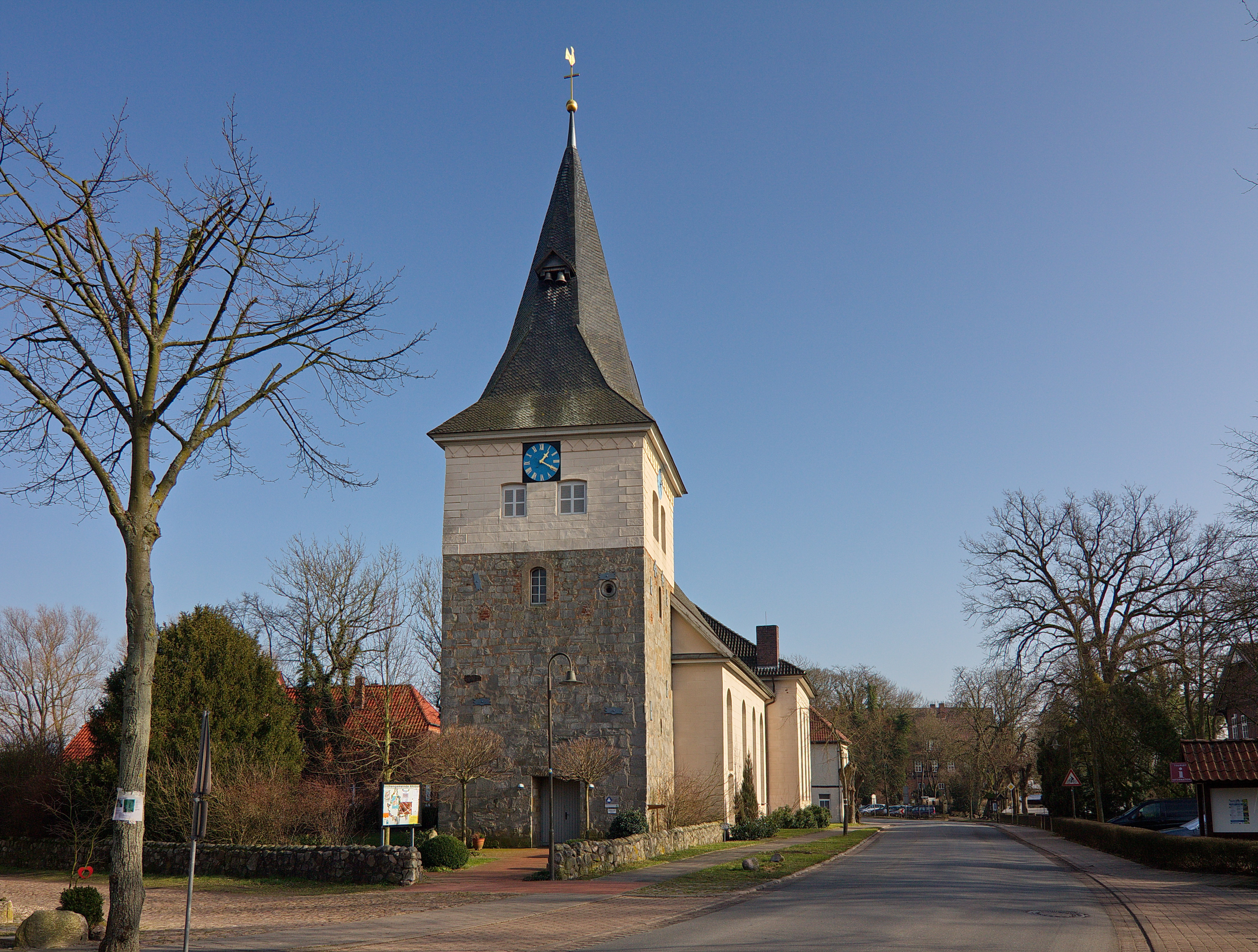 St. Johannis der Täufer Kirche in Ahlden (Aller), Niedersachsen, Deutschland